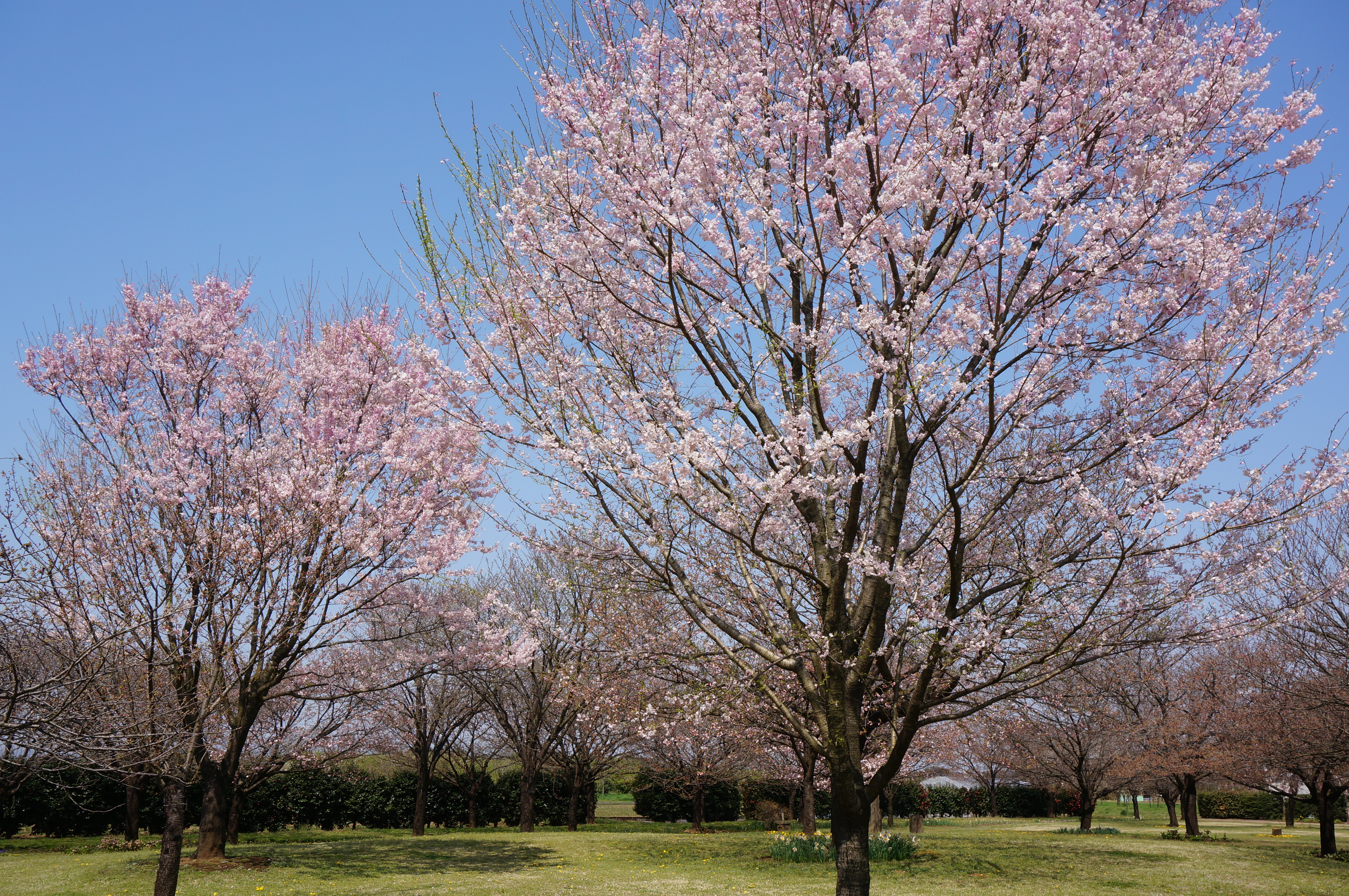 日本花の会 結城農場のマイヒメの原木